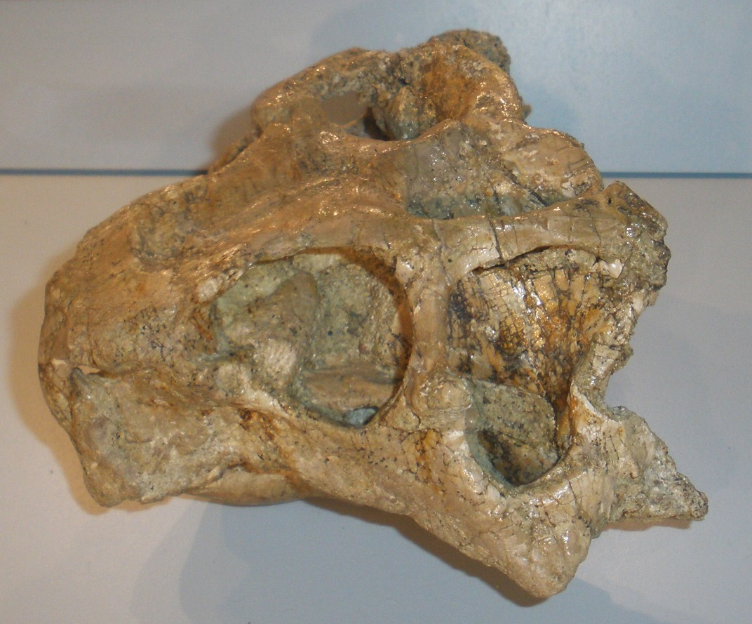 Fossil of Psittacosaurus, an ornithischian dinosaur Took the photo at Musee d'Histoire Naturelle, Brussels